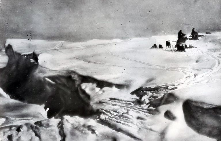 Beskrivelse: "Roald Amundsen lykkelig over et farlig sprekkområde øverst i oppstigningen til Sydpolsplatået – kalt Helvetesporten av Amundsen, 30. november 1911." Fotograf: Amundsenekspedisjonen Arkivreferanse: Riksarkivet, UD Avdeling for presse, kultur og informasjon, Uc1, Roald Amundsen Dangerous journey Description: "A happy Roald Amundsen just passed a dangerous ridge of ice up towards the South Pole Plateau, which he called Hell's Gate, November 30, 1911." Photo: The Amundsen Expedition